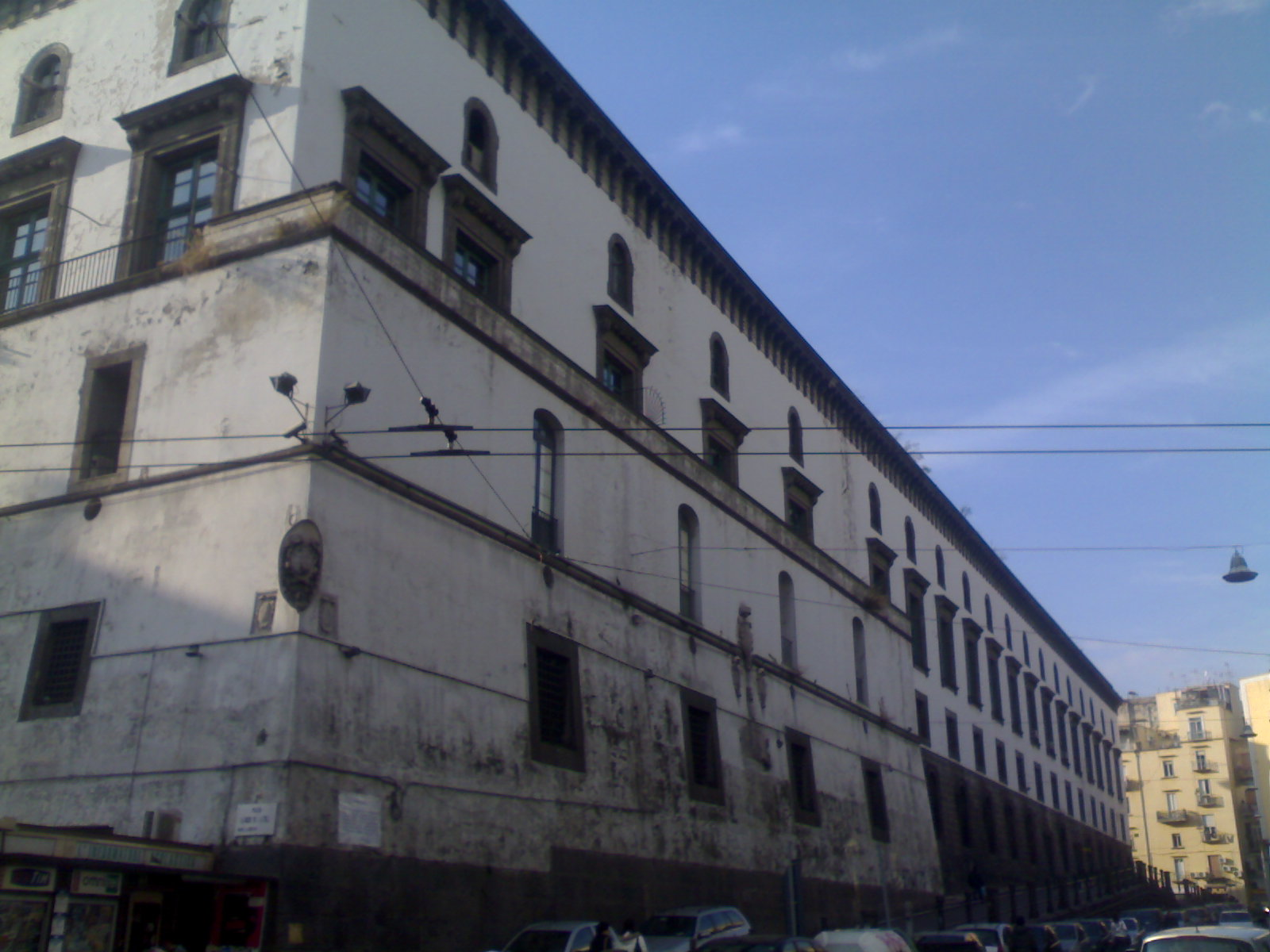 Prospetto laterale (Castel Capuano)